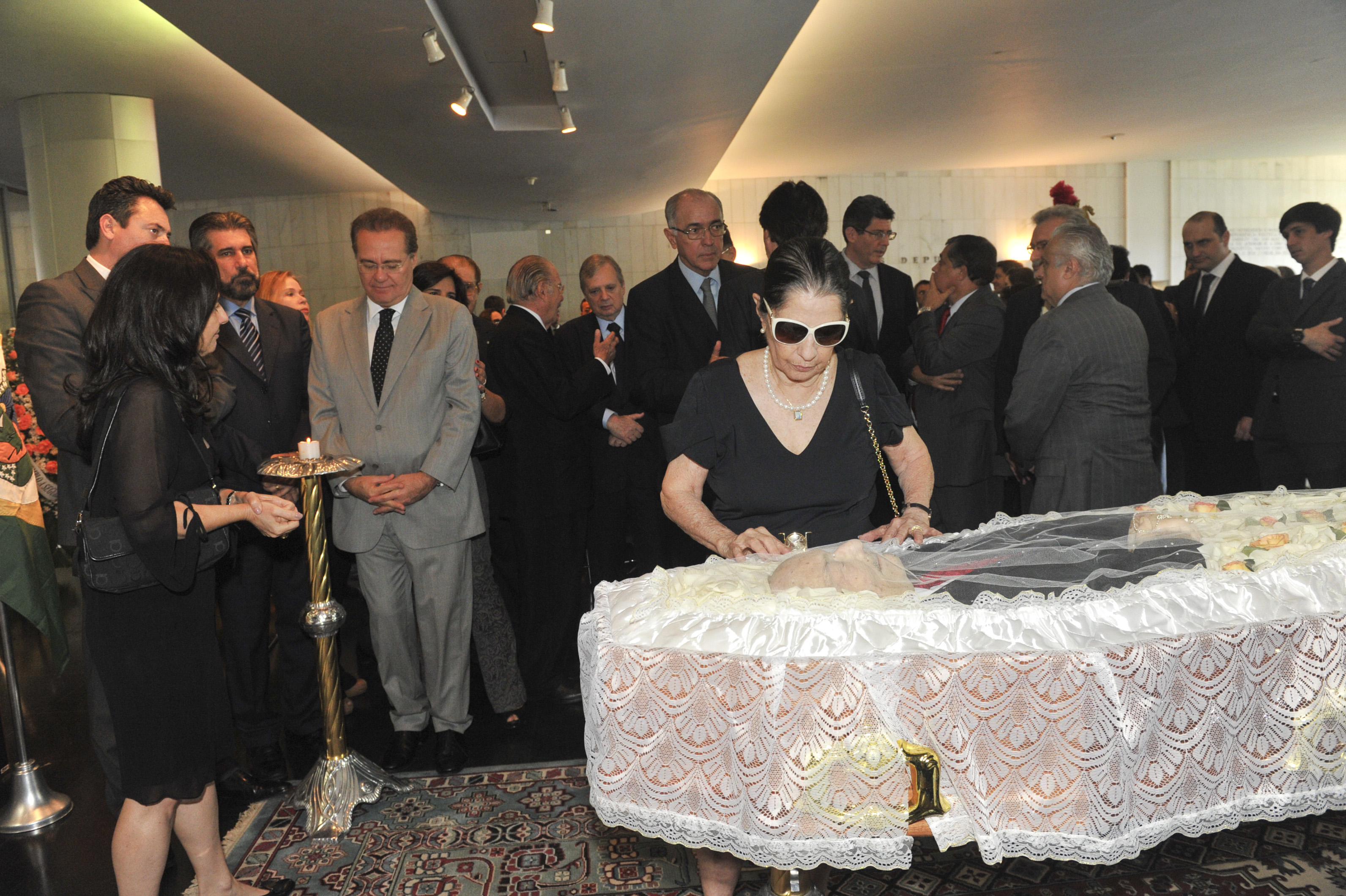 Velório do ex-presidente da Câmara dos Deputados, Antonio Paes de Andrade, no Salão Negro do Congresso Nacional. Foto: Jane de Araújo/Agência Senado